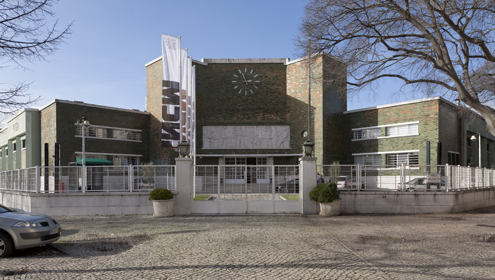 Casa da Moeda, Lisboa; Arq. Jorge Segurado